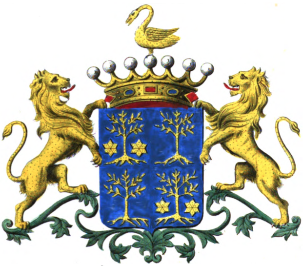 Armoiries de la famille de Bagenrieux